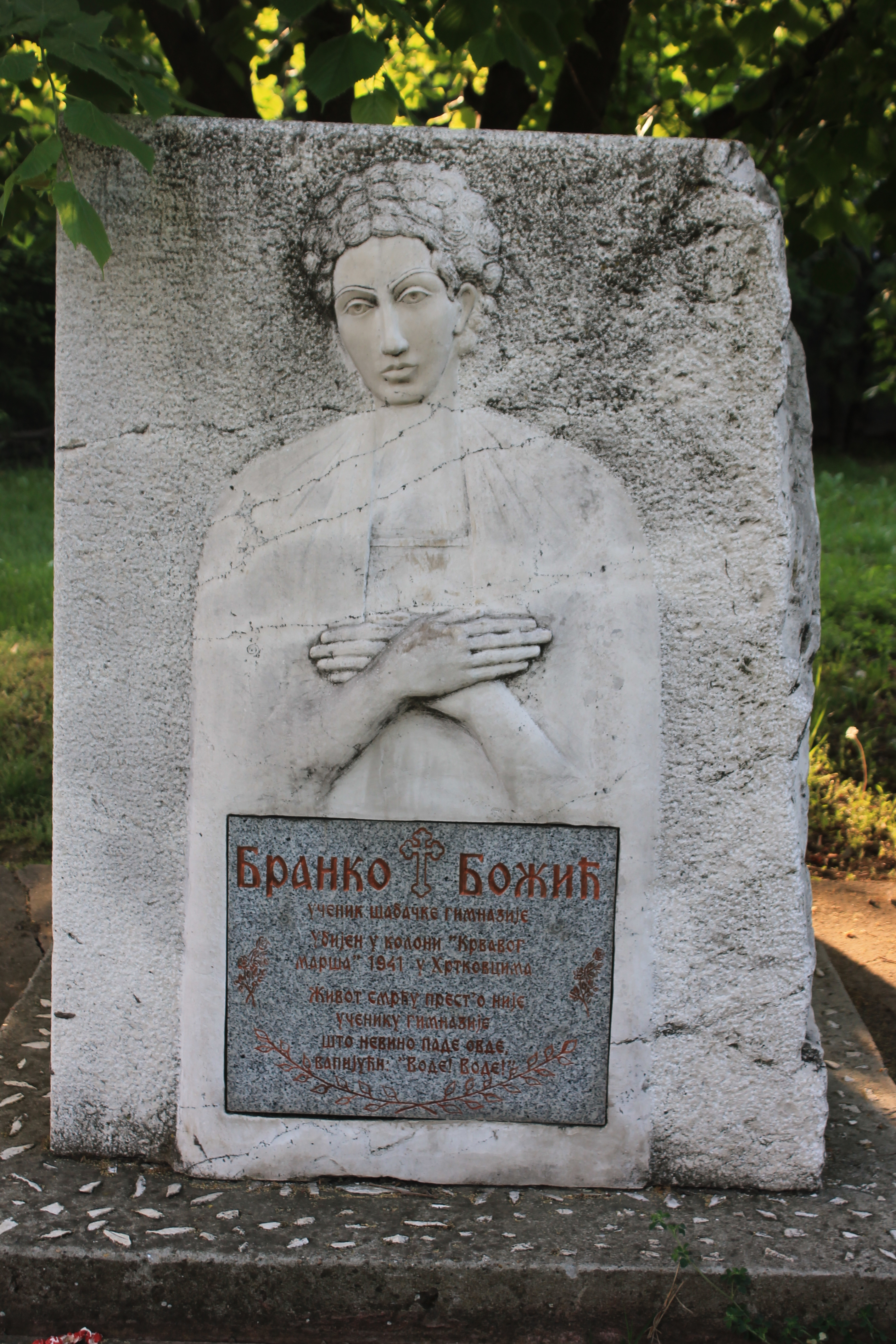 Crkva Sv. velikomučenika Georgija